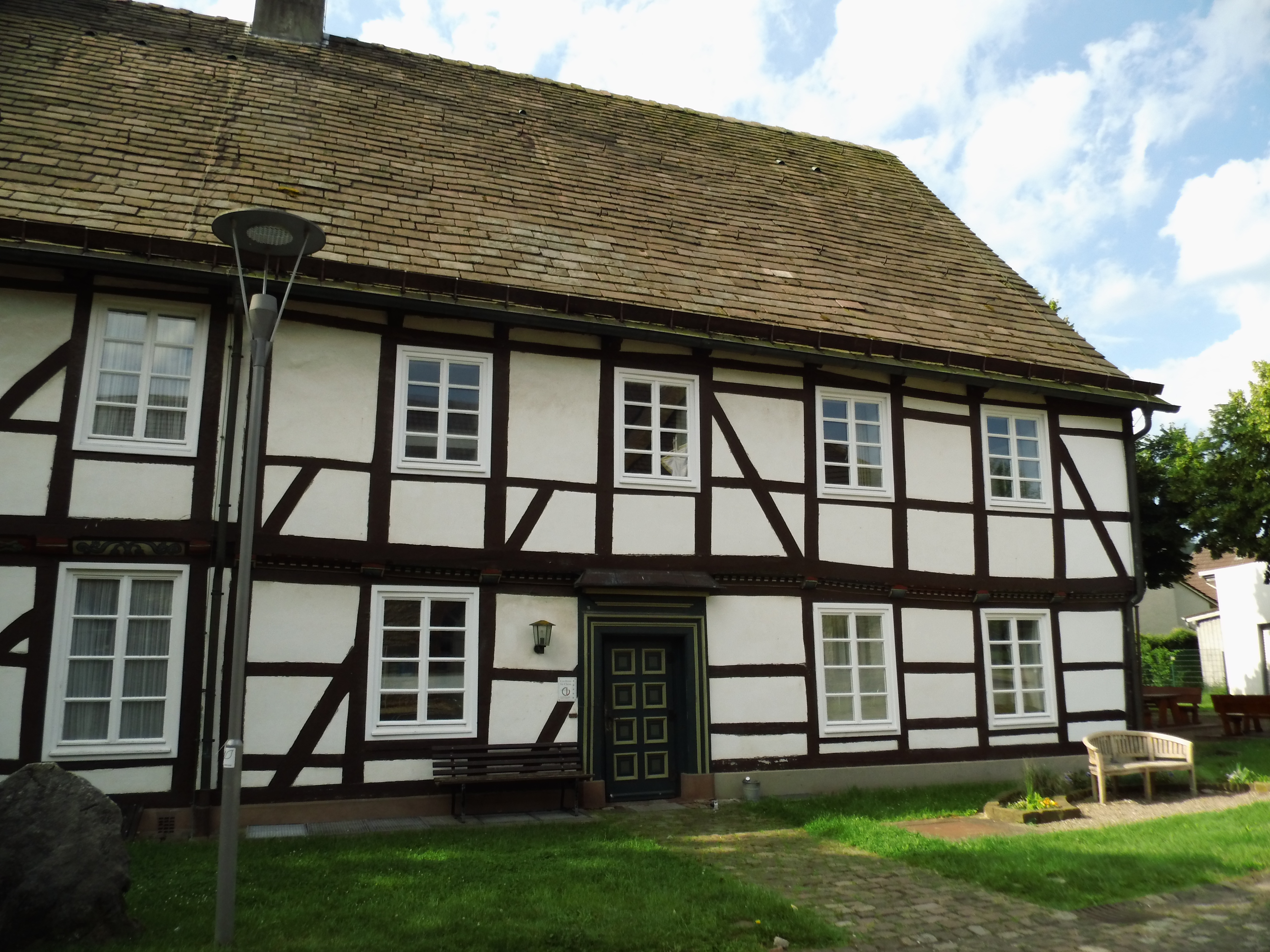 Baudenkmal, Liste der Baudenkmäler in Höxter Nr. 257